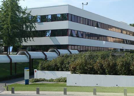 ITIN, Bâtiment Galilée